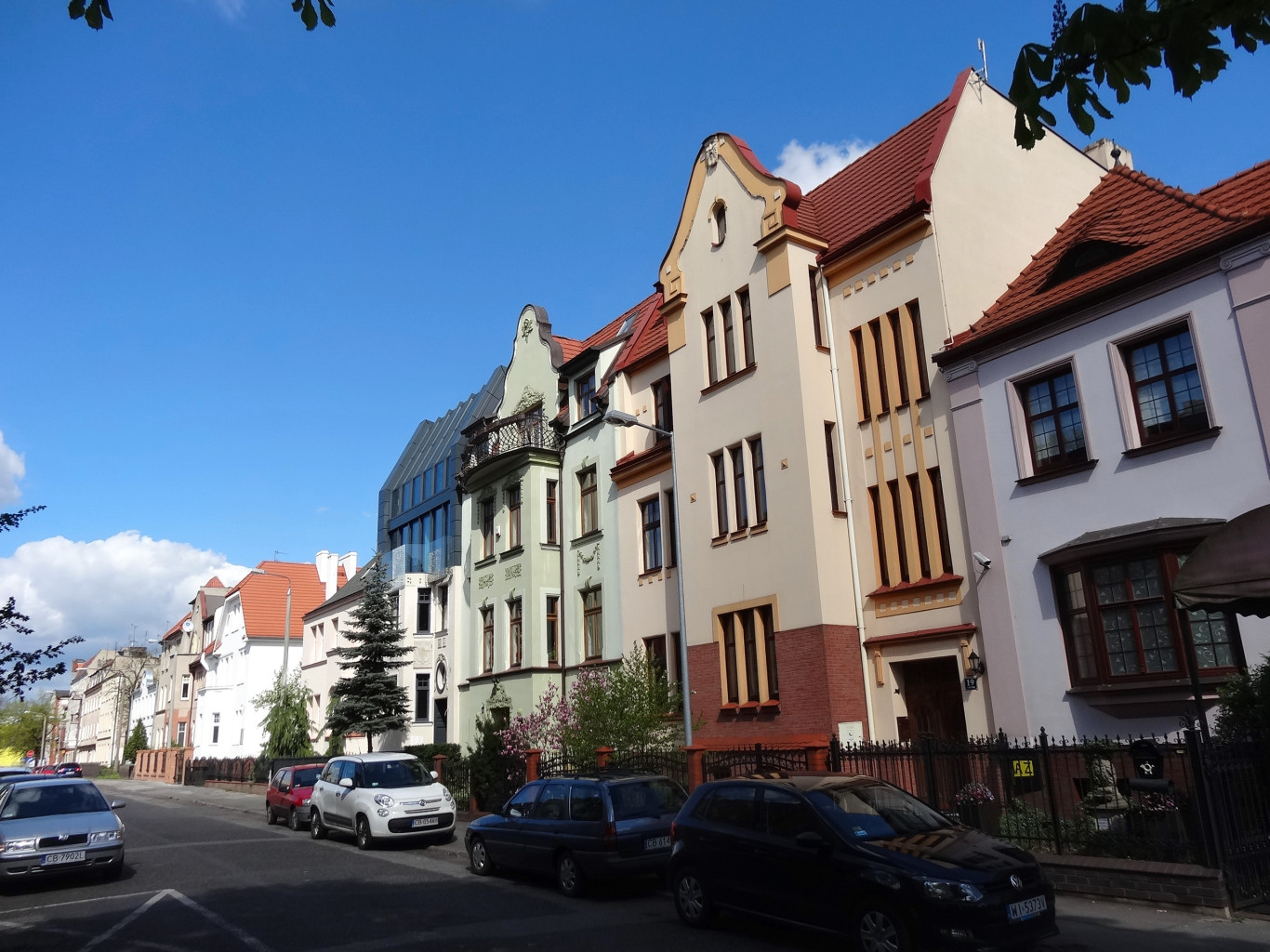 Ulica Krakowska w Bydgoszczy